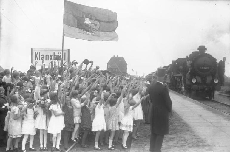 Klanxbüll, Eröffnung Eisenbahndamm Sylt Die feierliche Eröffnung des 11 km-langen Sylter Eisenbahndammes von Klanxbüll nach Westerland! Am 1. Juni fand die feierliche Eröffnung des neuen Eisenbahndammes durch den Reichspräsidenten von Hindenburg und den Generaldirektor der Reichsbahn Dr. Dorpmüller statt. Unter großem Jubel der Bevölkerung passierte der erste Zug den Sylter Damm. Die Baukosten des Dammes betrugen ca. 25 Millionen Mark. Der Einweihung wohnten außerdem die Reichsminister Herght, Koch und Dr. Gessler bei. Der erste Zug, festlich mit Girlanden geschmückt, wird freudig begrüßt bei seiner Ankunft in Klanxbüll.